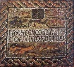 NECROPOLE OCCIDENTALE DE TIPASA (MATARES).